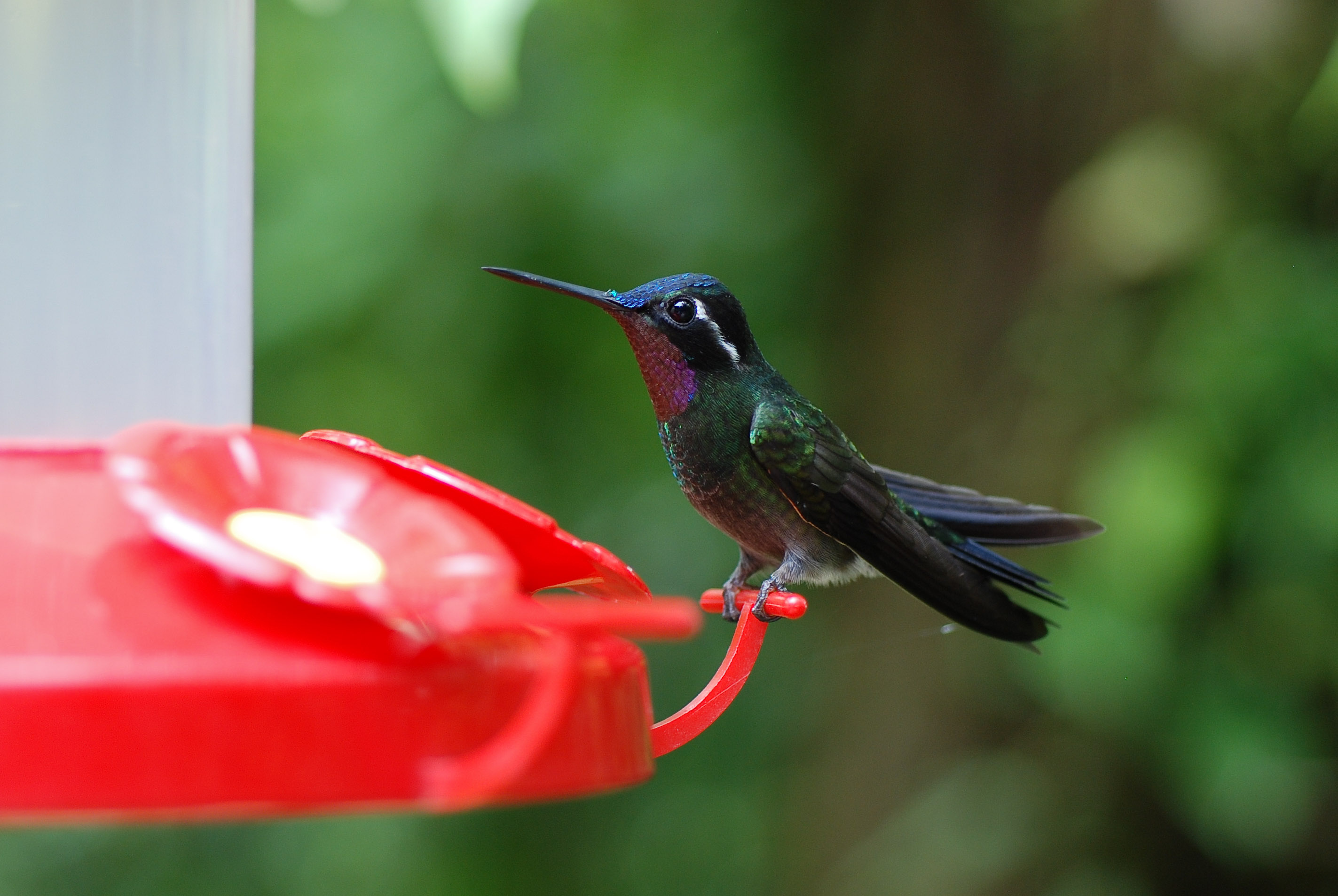 Male Lampornis calolaemus from Monteverde (Costa Rica).